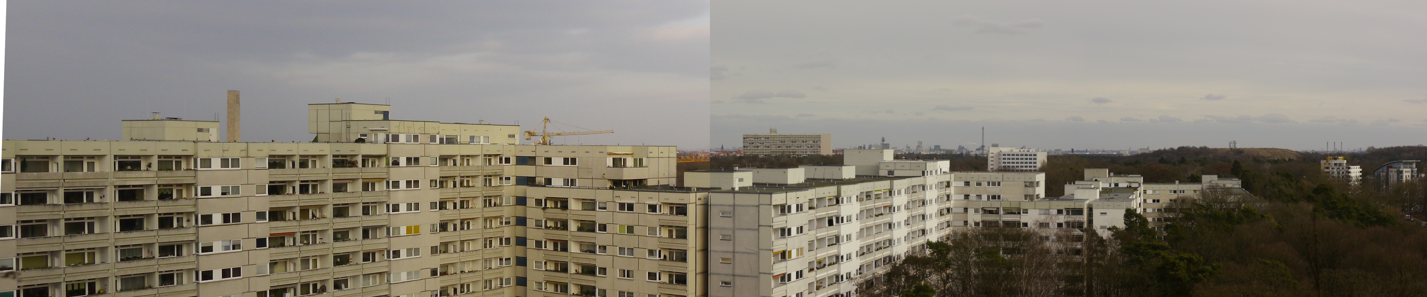 Hochhäuser auf dem Pichelsberg zwischen Angerburger Allee und Heerstaße, erbaut 1970